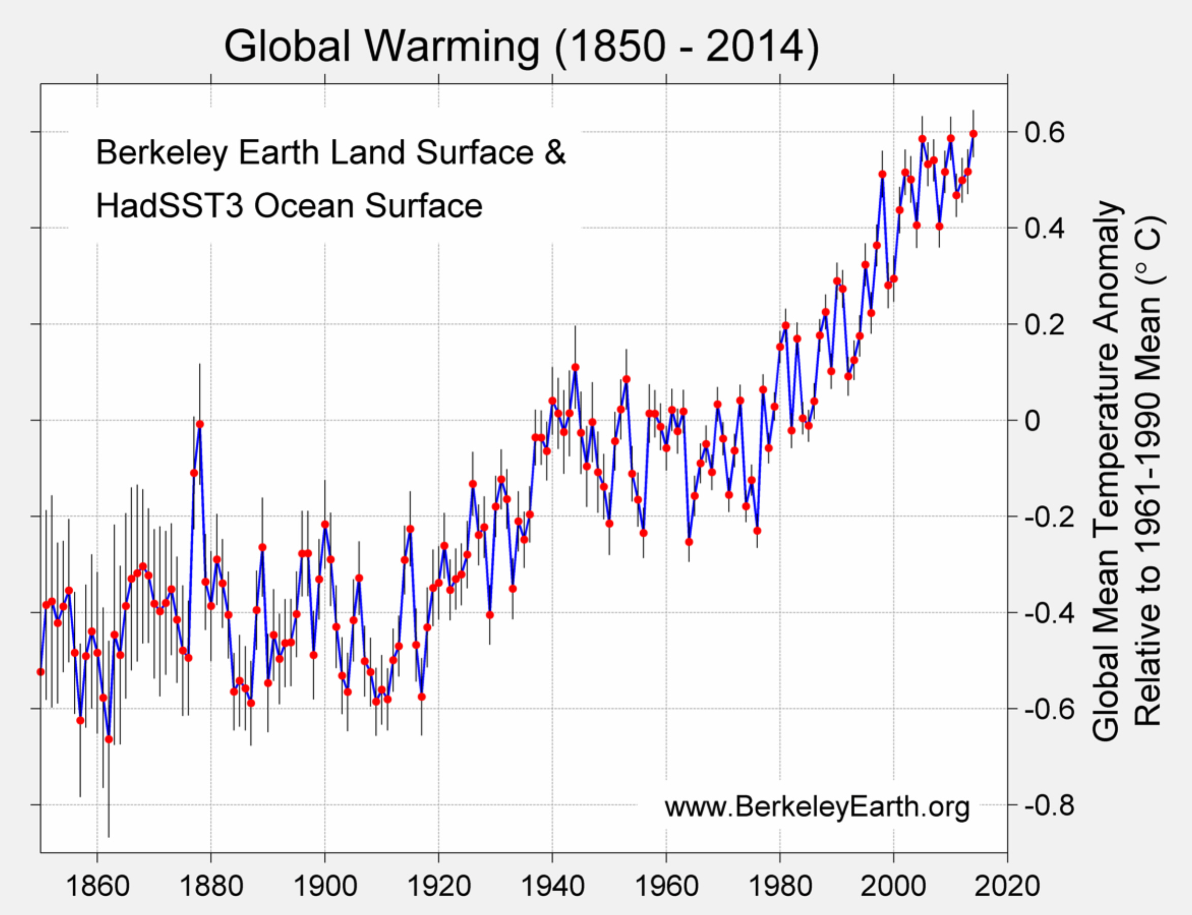 Globale Temperaturveränderung rel. zu Mittelwert "1961-1990" 2014 0.596 ±0.049°C 2010 0.586 ±0.045°C 2005 0.585 ±0.047°C 2007 0.541 ±0.044°C 2006 0.533 ±0.046°C 2013 0.517 ±0.046°C 2009 0.517 ±0.044°C 2002 0.516 ±0.048°C 1998 0.512 ±0.048°C 2003 0.501 ±0.048°C